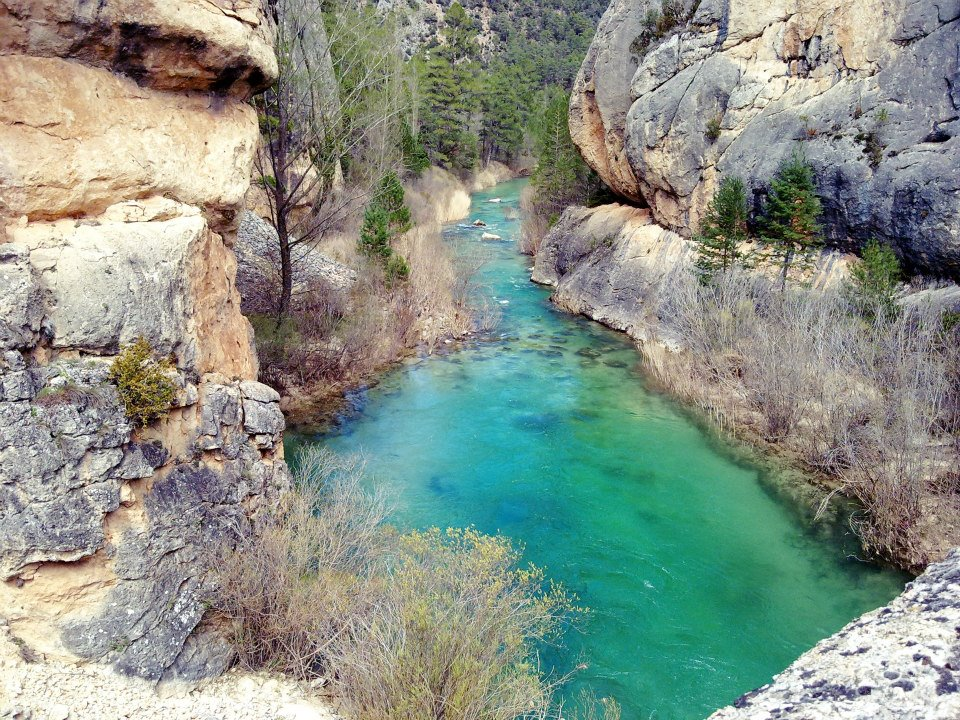 Alto Tajo. Fotos de nuestro viaje con el INEF de Madrid. This is a photography of a Special Area of Conservation in Spain with the ID: ES4240016. Natura2000 entry, EEA entry